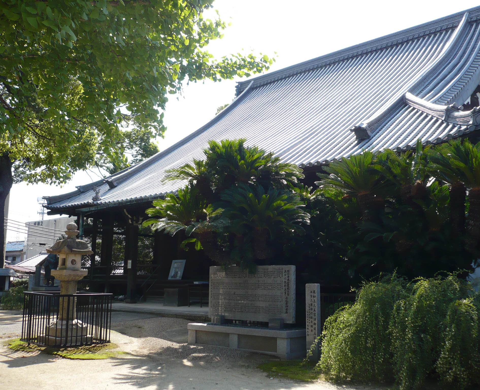 境内